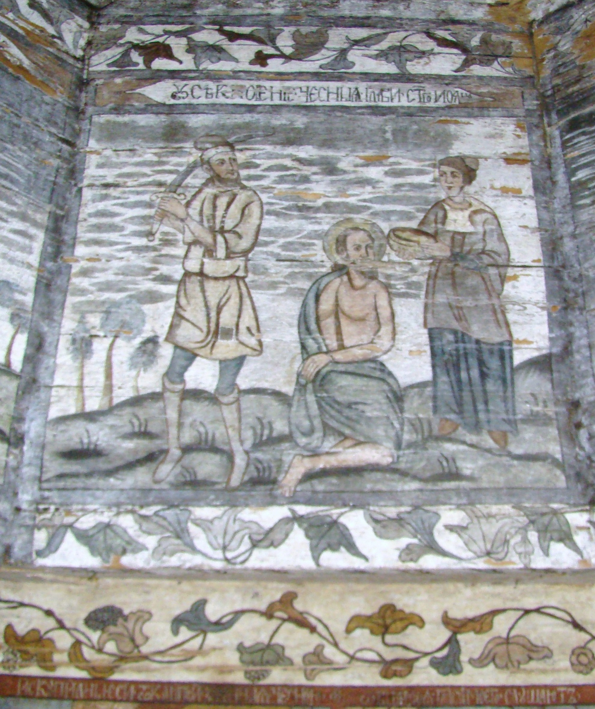 Biserica de lemn "Sfântul Nicolae", sat BOGDAN VODĂ